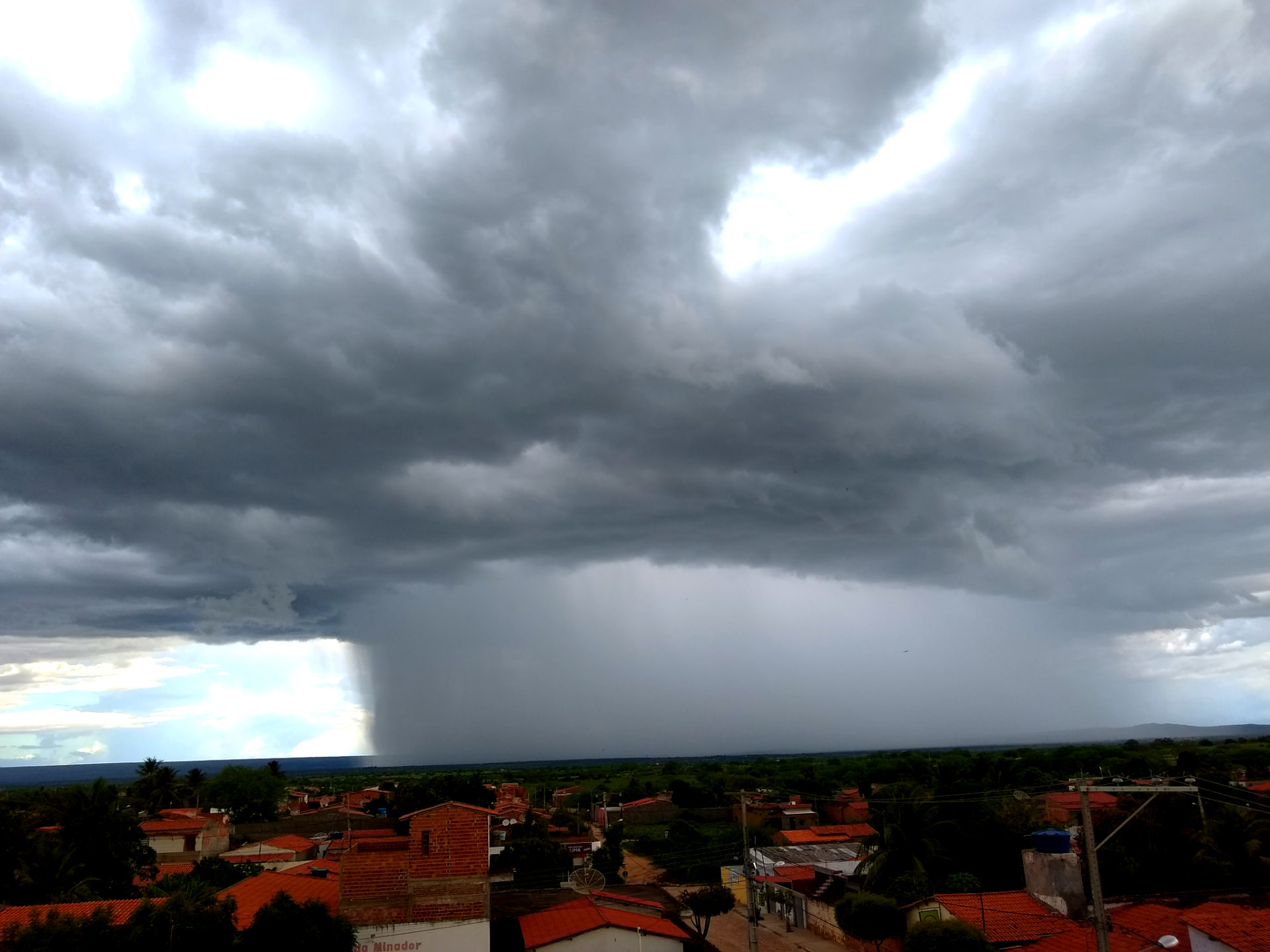 Registro de formação de trovoada e precipitação chuvosa na Cidade de Araci - Bahia.